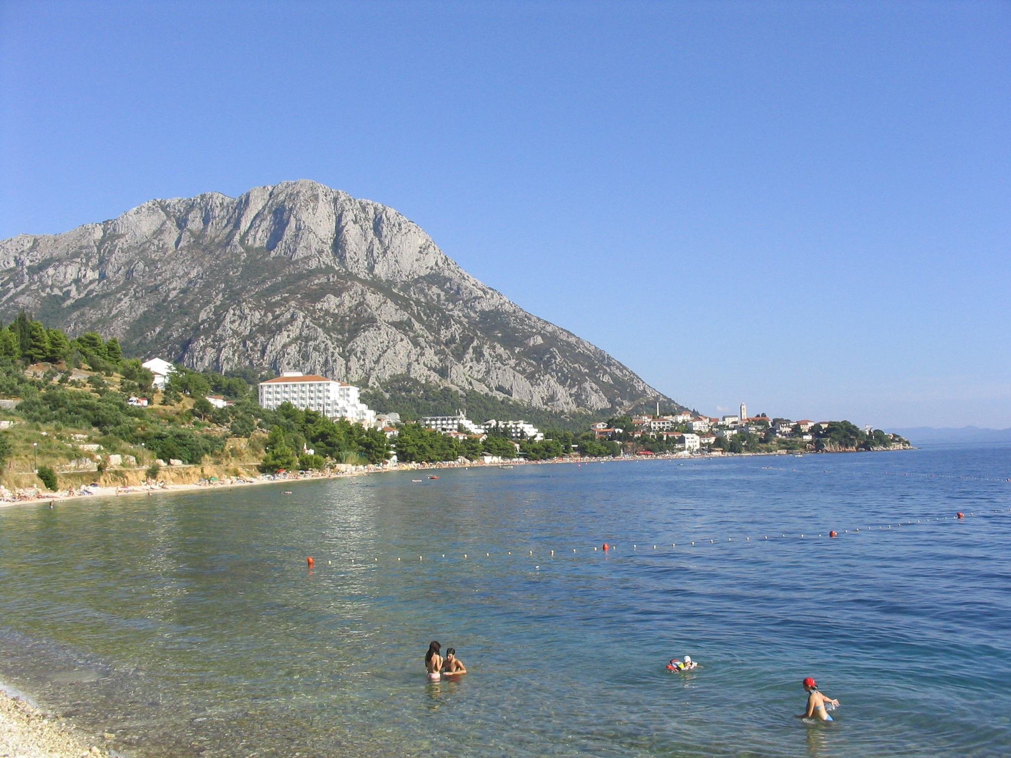 Blick auf Gradac und den Sv. Ilja von der Strandpromenade nach Brist aus. Aufgenommen am 11.08.2006 von Dr. Hagen Graebner